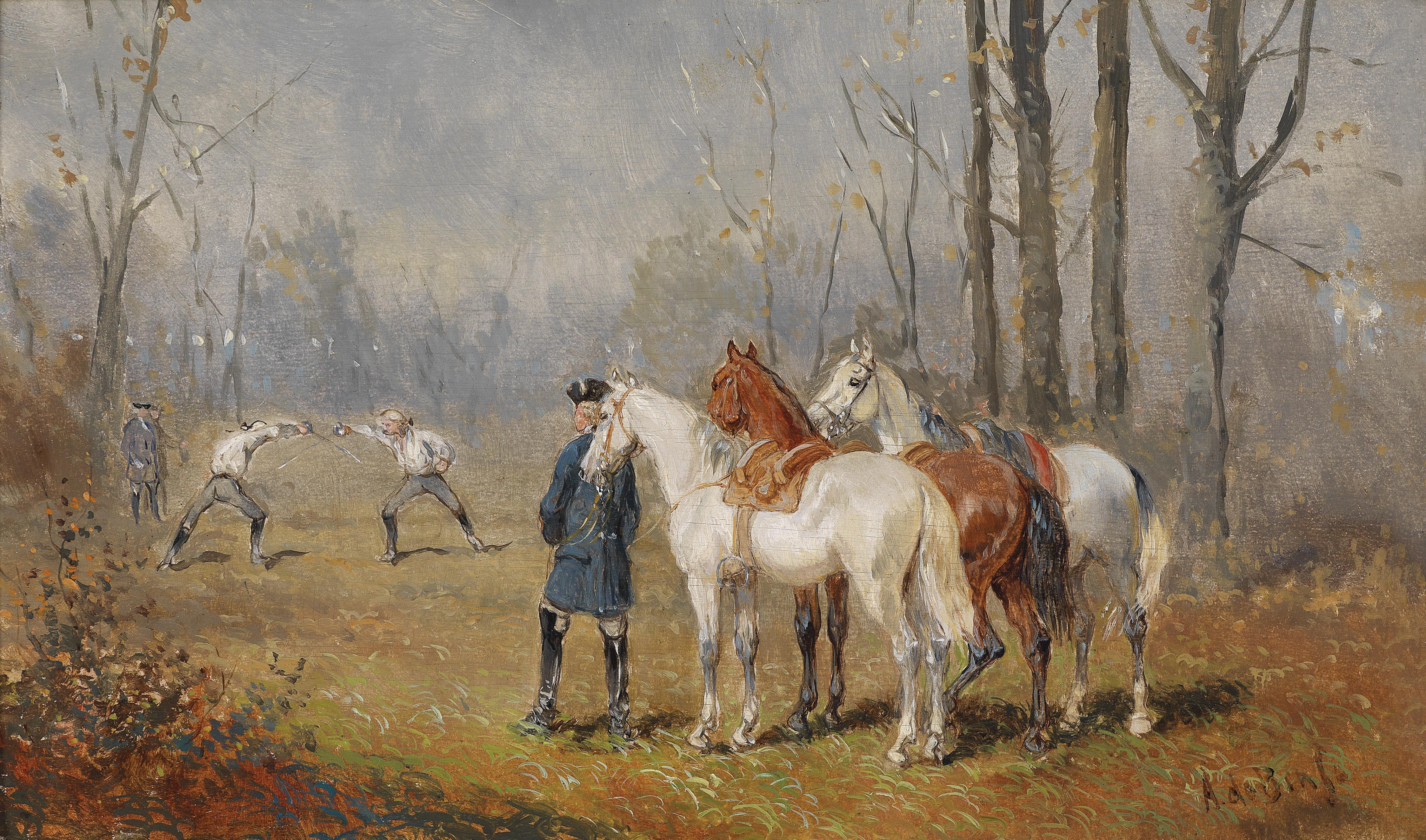 Das Duelllabel QS:Lde,"Das Duell"